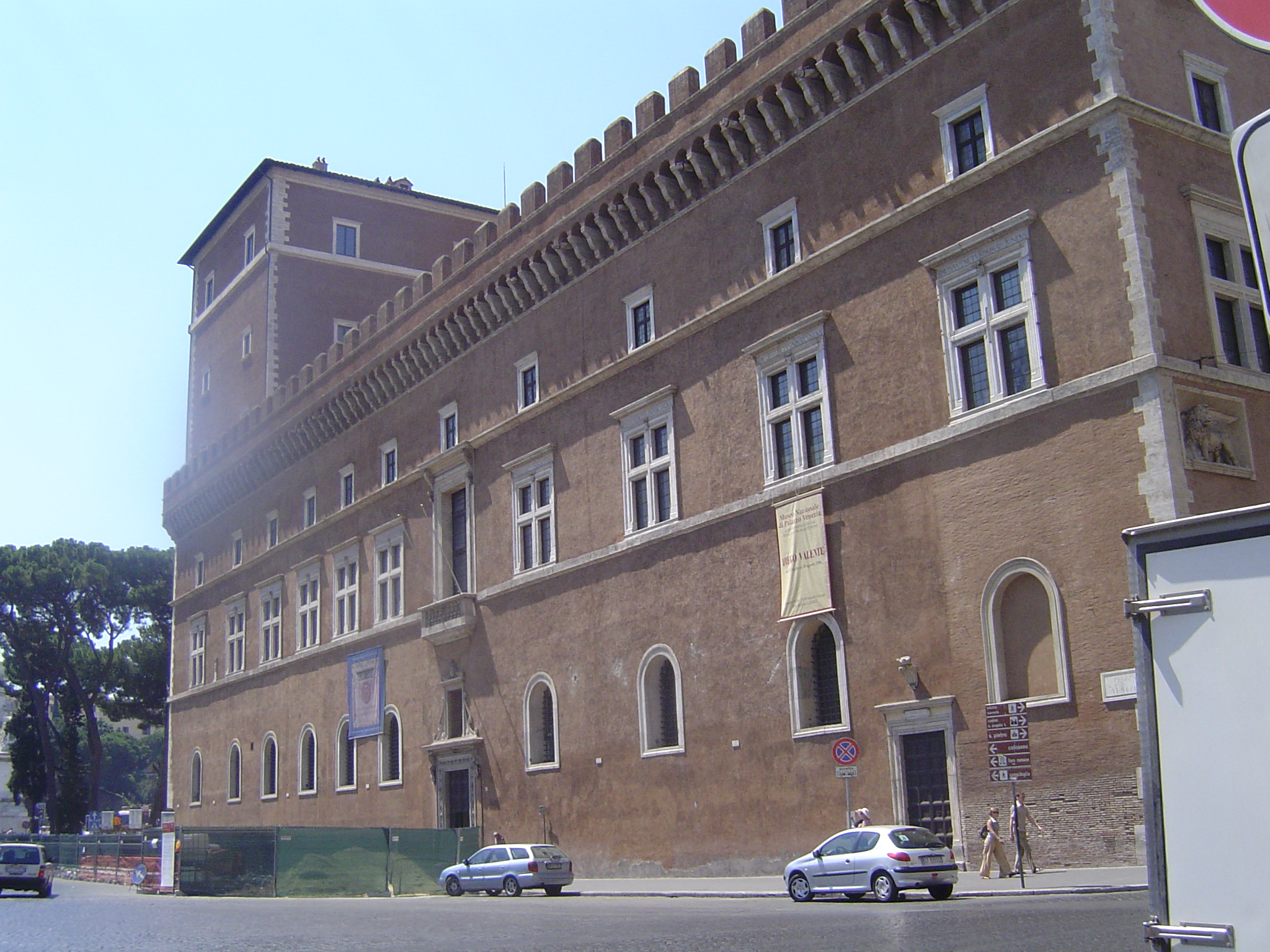 Roma, Italia